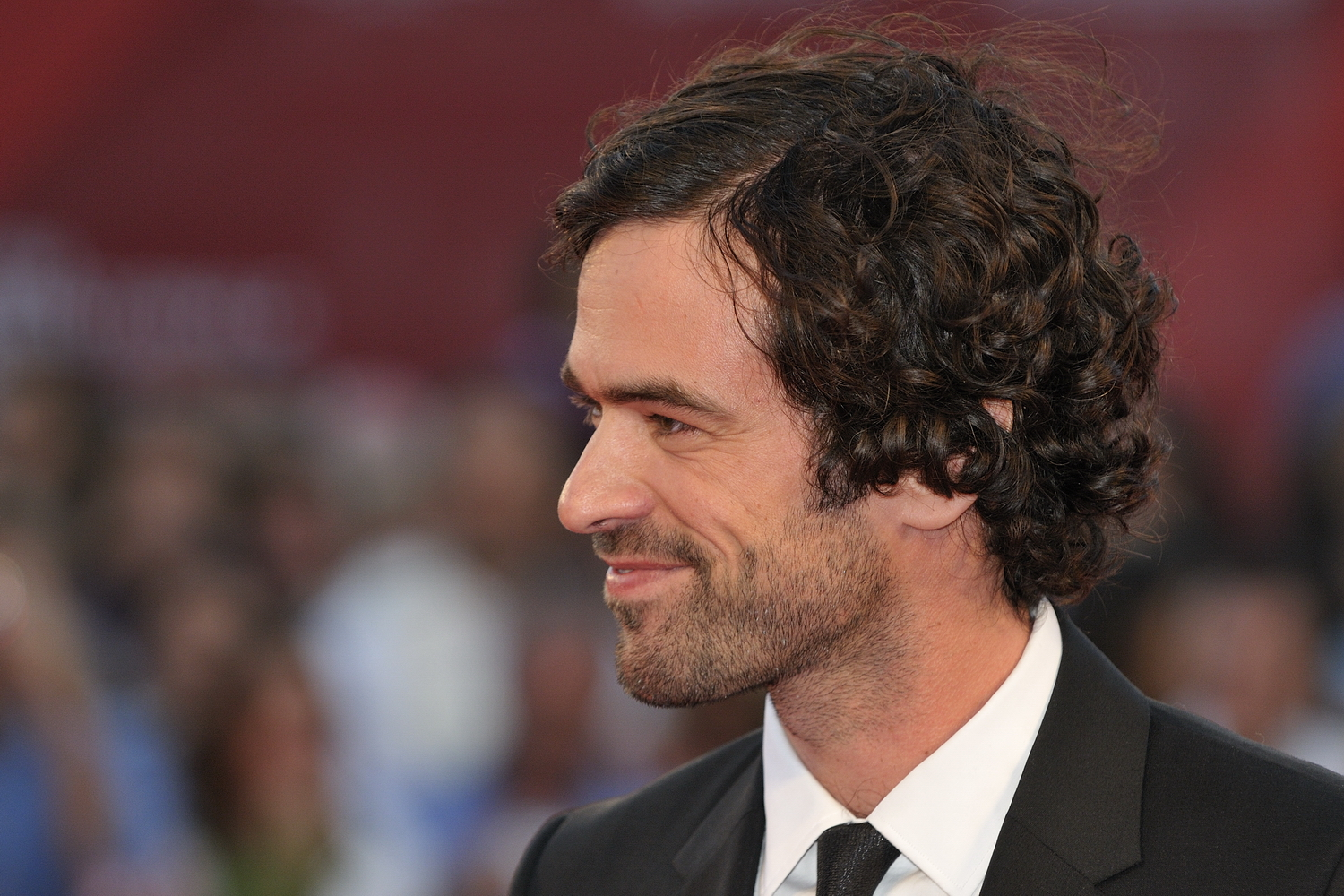 66ème Festival du Cinéma de Venise (Mostra), 4ème jour (05/09/2009) Tapis Rouge avec Romain Duris pour le film : Persécution